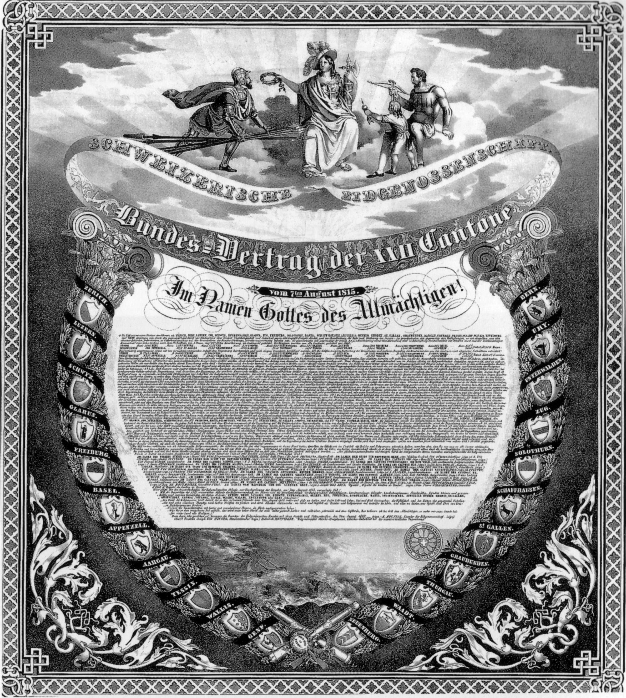 Der Bundesvertrag vom 7. August 1815 zwischen den 22 Kantonen der Schweiz, die staatliche Grundlage der Schweizerischen Eidgenossenschaft zwischen 1815 und 1848. Rund um die Vertragsbestimmungen die Wappen der 22 Kantone mit den alten Wappen von Neuenburg und Graubünden